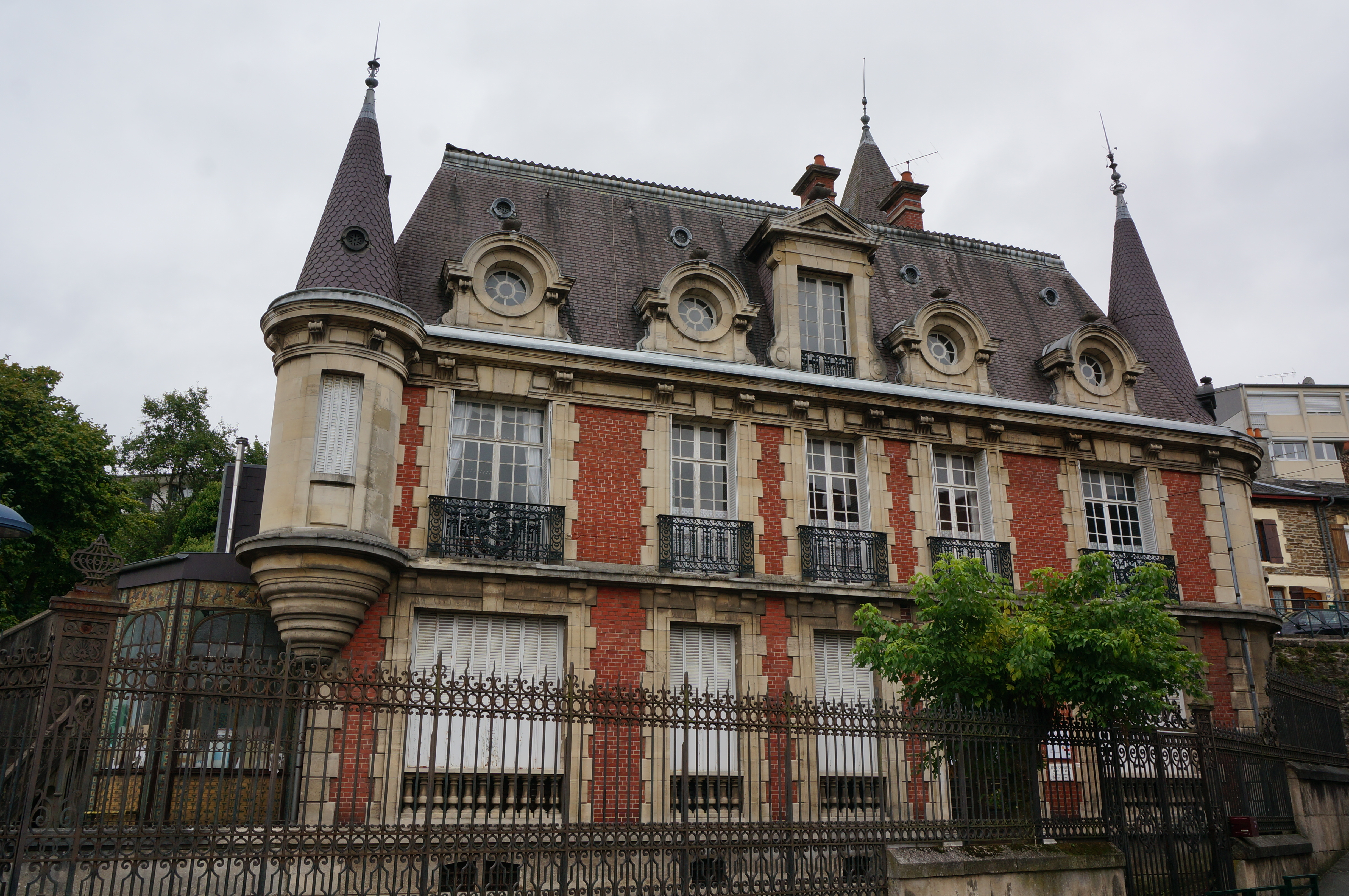 Ancien Château Crepel de Nouzonville .